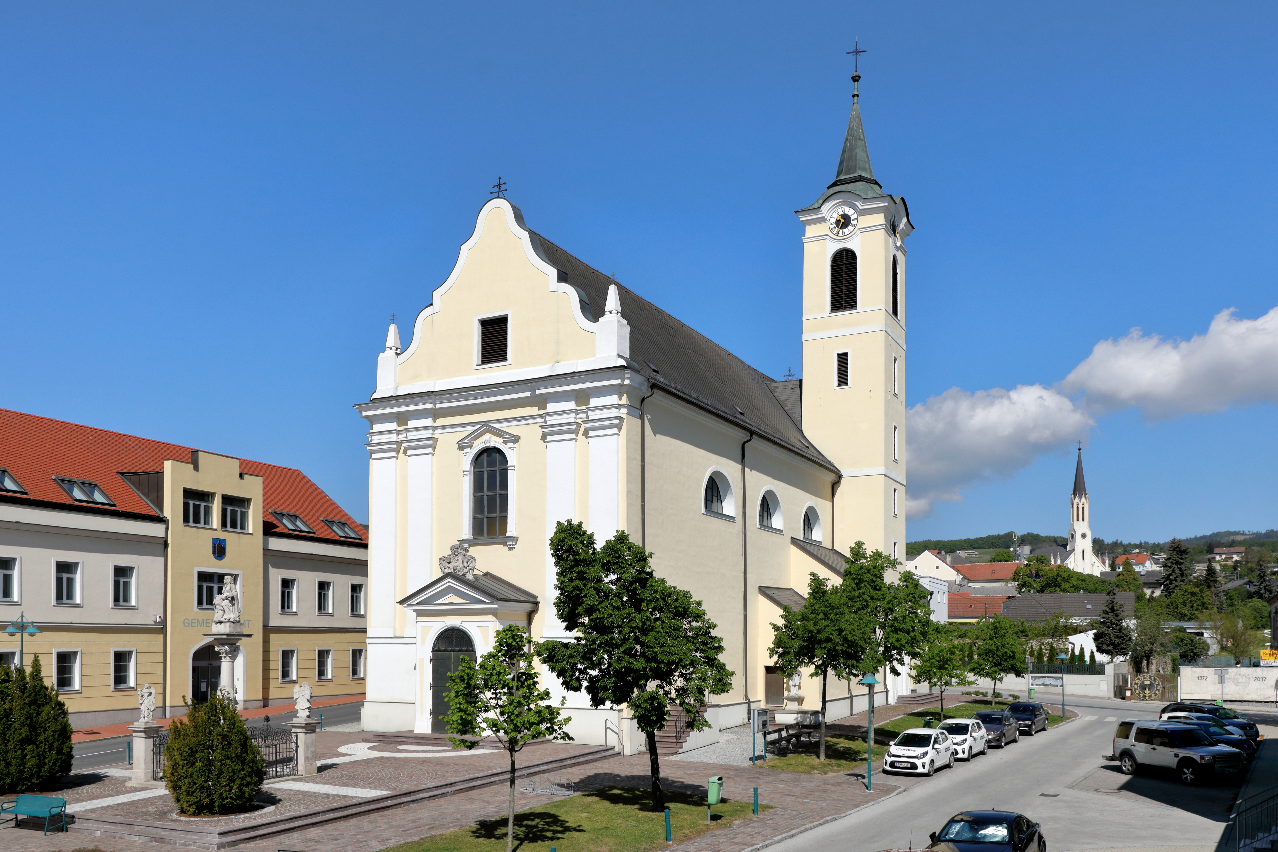 Südostansicht der röm.-kath. Pfarrkirche hl. Katharina am Hauptplatz in der burgenländischen Marktgemeinde Rechnitz und links das Gemeindeamt sowie rechts hinten die evangelische Pfarrkirche.